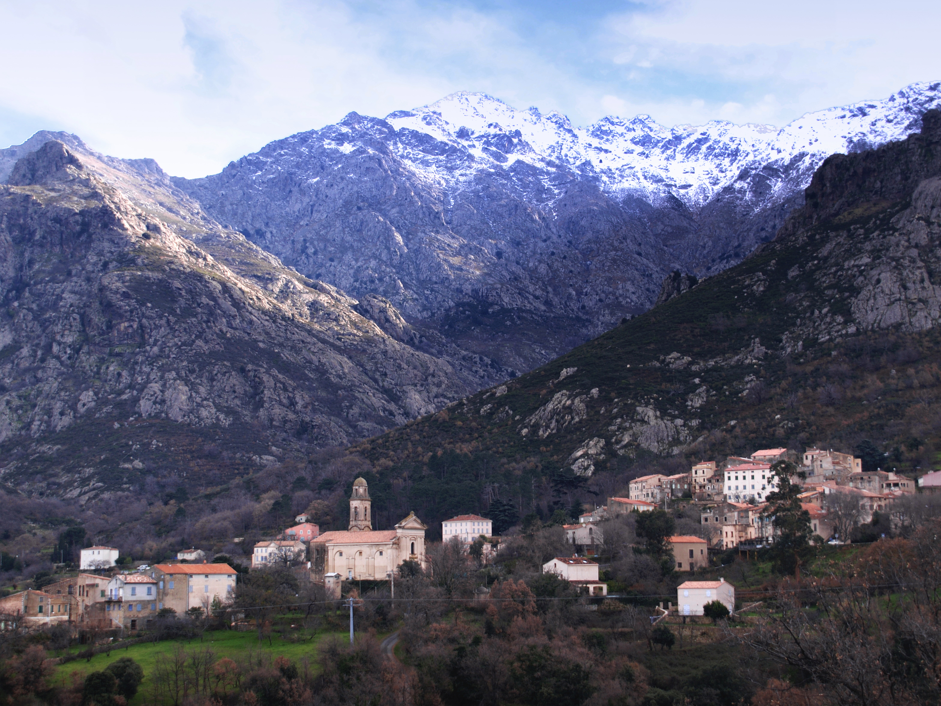 Feliceto, Balagne (Corse) - Le village de Feliceto avec, en arrière, la haute vallée du Regino et le San Parteo (1680 m).